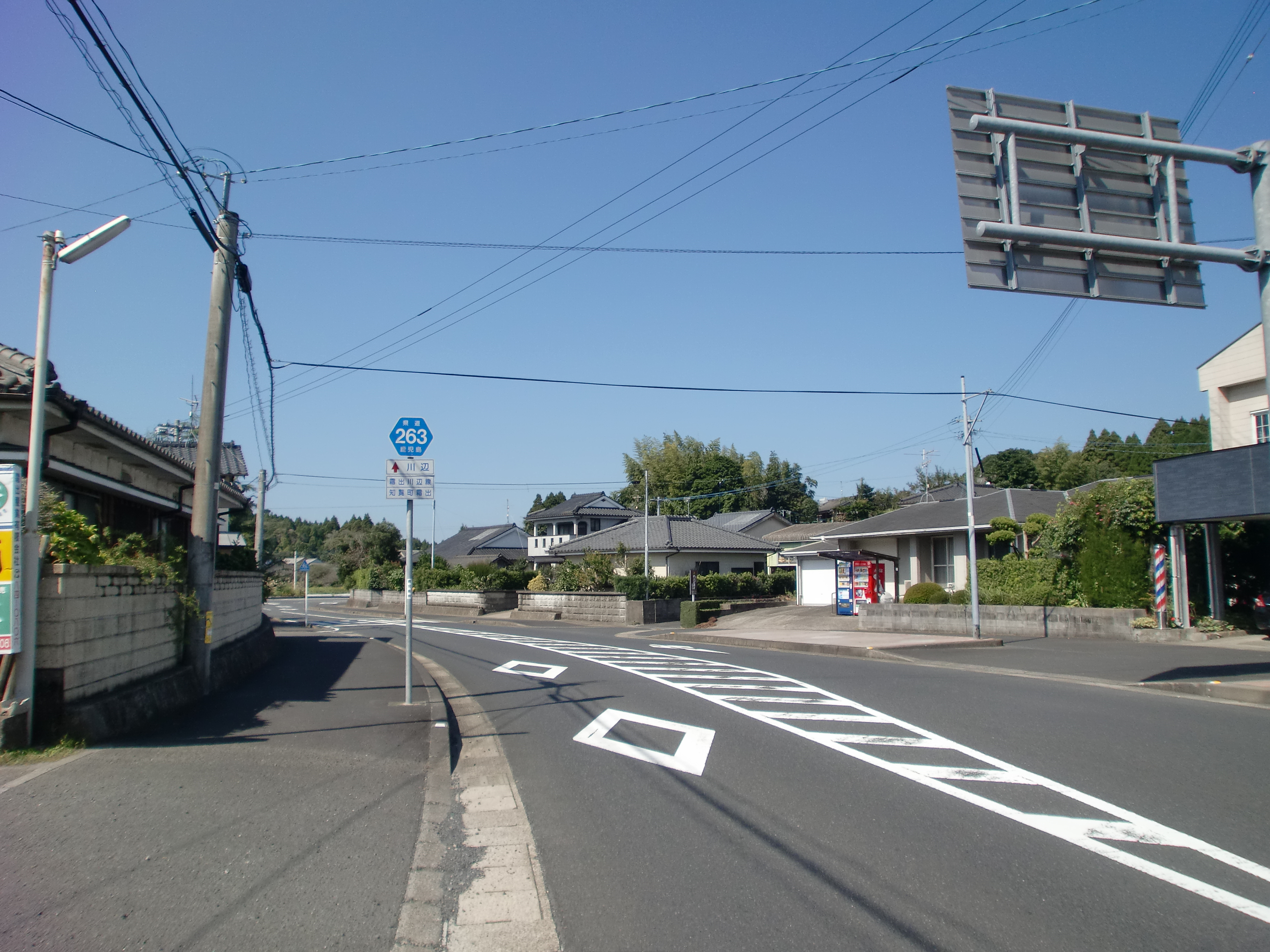 鹿児島県道263号霜出川辺線を起点付近から川辺方面を望む。